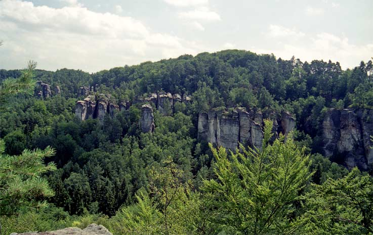 Příhrazské skály autor:Zp